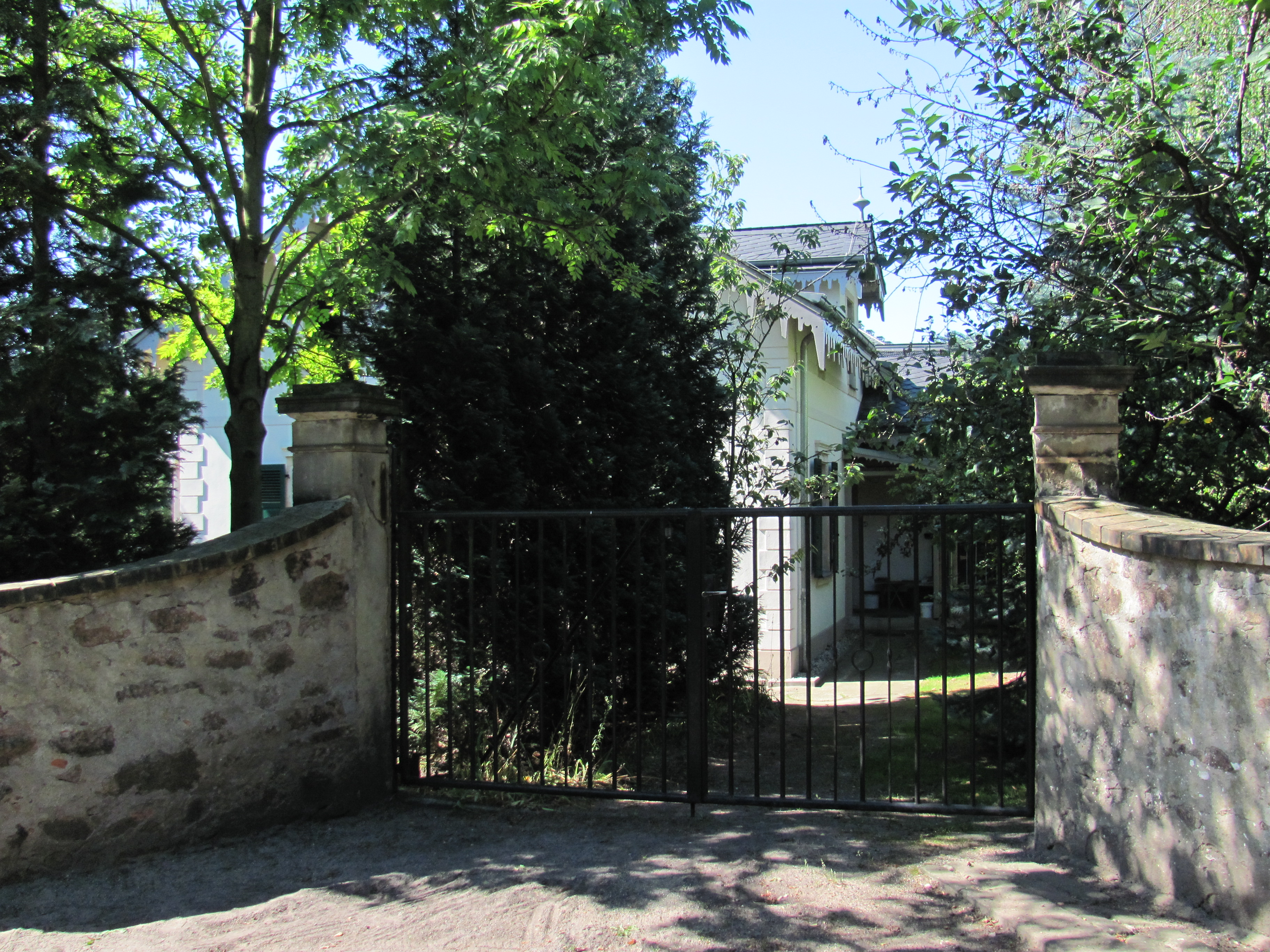 Radebeul Bennostr 23